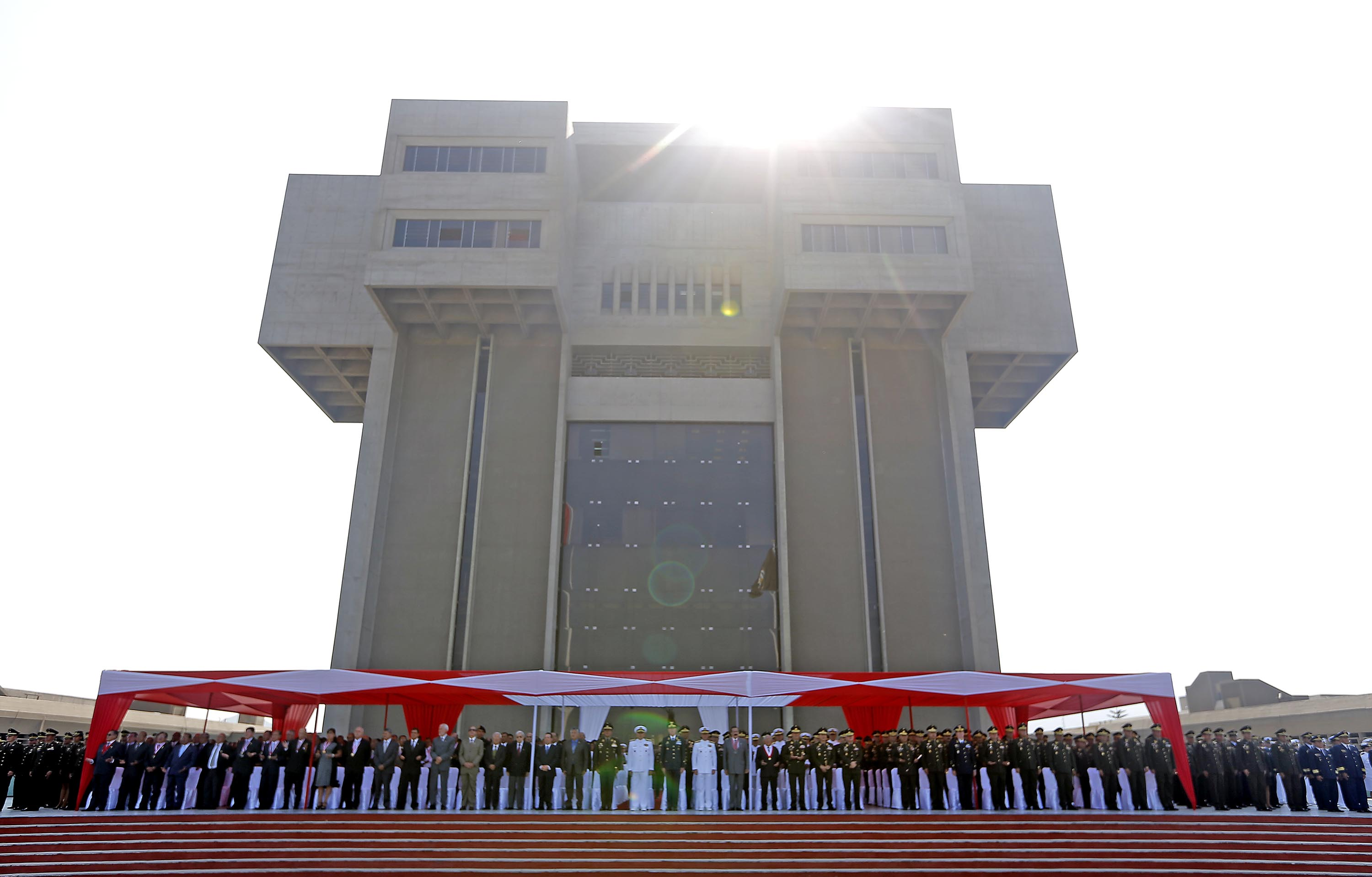 Las Fuerzas Armadas conmemoraron el 34 aniversario de las operaciones militares en la Cordillera del Cóndor, para rendir homenaje a los soldados que lucharon en defensa de la integridad territorial del Perú. La ceremonia, presidida por el Jefe del Comando Conjunto de las Fuerzas Armadas, Almirante Jorge Moscoso Flores, se realizó en la Plaza Bolognesi del Cuartel General del Ejército, y participaron autoridades militares quienes conmemoraron el valor de las tropas peruanas durante el conflicto con Ecuador. El 22 de enero de 1981, nuestras Fuerzas Armadas actuaron frente a una infiltración ecuatoriana en la zona de la Cordillera del Cóndor, detectada por la Aviación del Ejército. Días después, en una operación militar impecable se desalojaron seis puestos de vigilancia ecuatorianos instalados en territorio peruano.